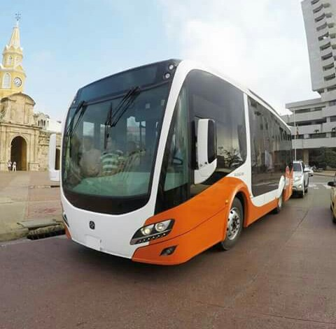 Hola mi nombre es Juan